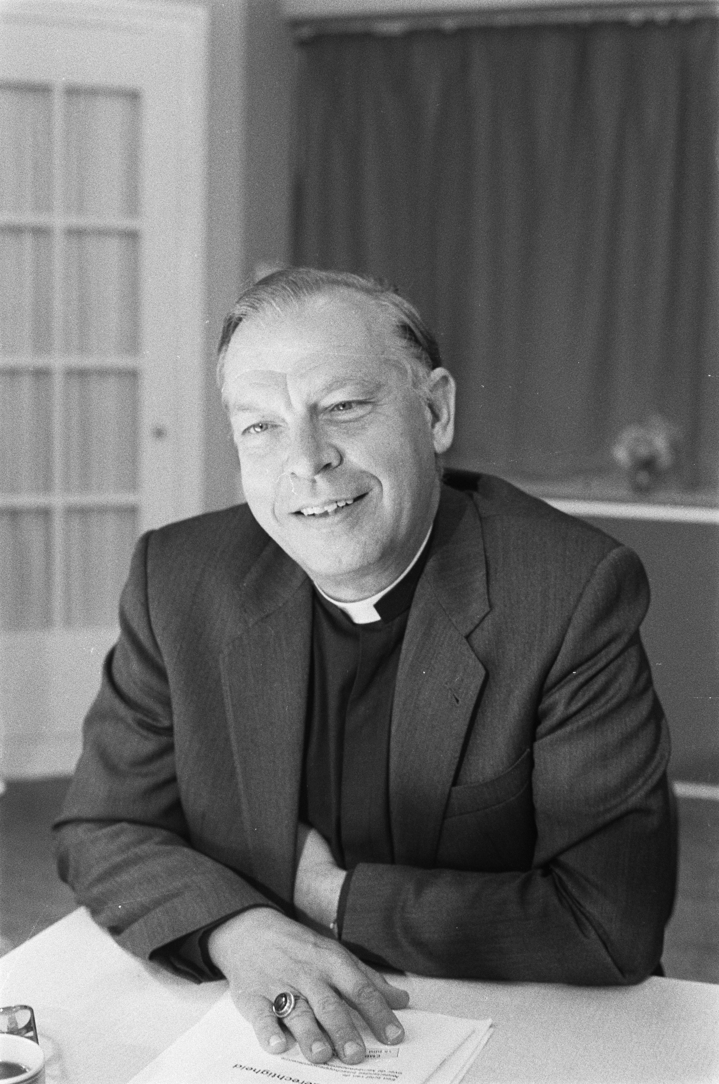 Collectie / Archief : Fotocollectie Anefo Reportage / Serie : Persconferentie van de rooms-katholieke bisschoppen van Nederland over het kernwapenstandpunt Beschrijving : Bisschop Bär Annotatie : Randnummers negatiefstrook: nr. 2a, 3a Bisschop Ernst Datum : 13 juni 1983 Trefwoorden : bisschoppen, katholicisme, kernwapens, ontwapening, persconferenties, portretten Persoonsnaam : Bär, R.P. Fotograaf : Croes, Rob C. / Anefo Auteursrechthebbende : Nationaal Archief Materiaalsoort : Negatief (zwart/wit) Nummer archiefinventaris : bekijk toegang 2.24.01.05 Bestanddeelnummer : 932-6200